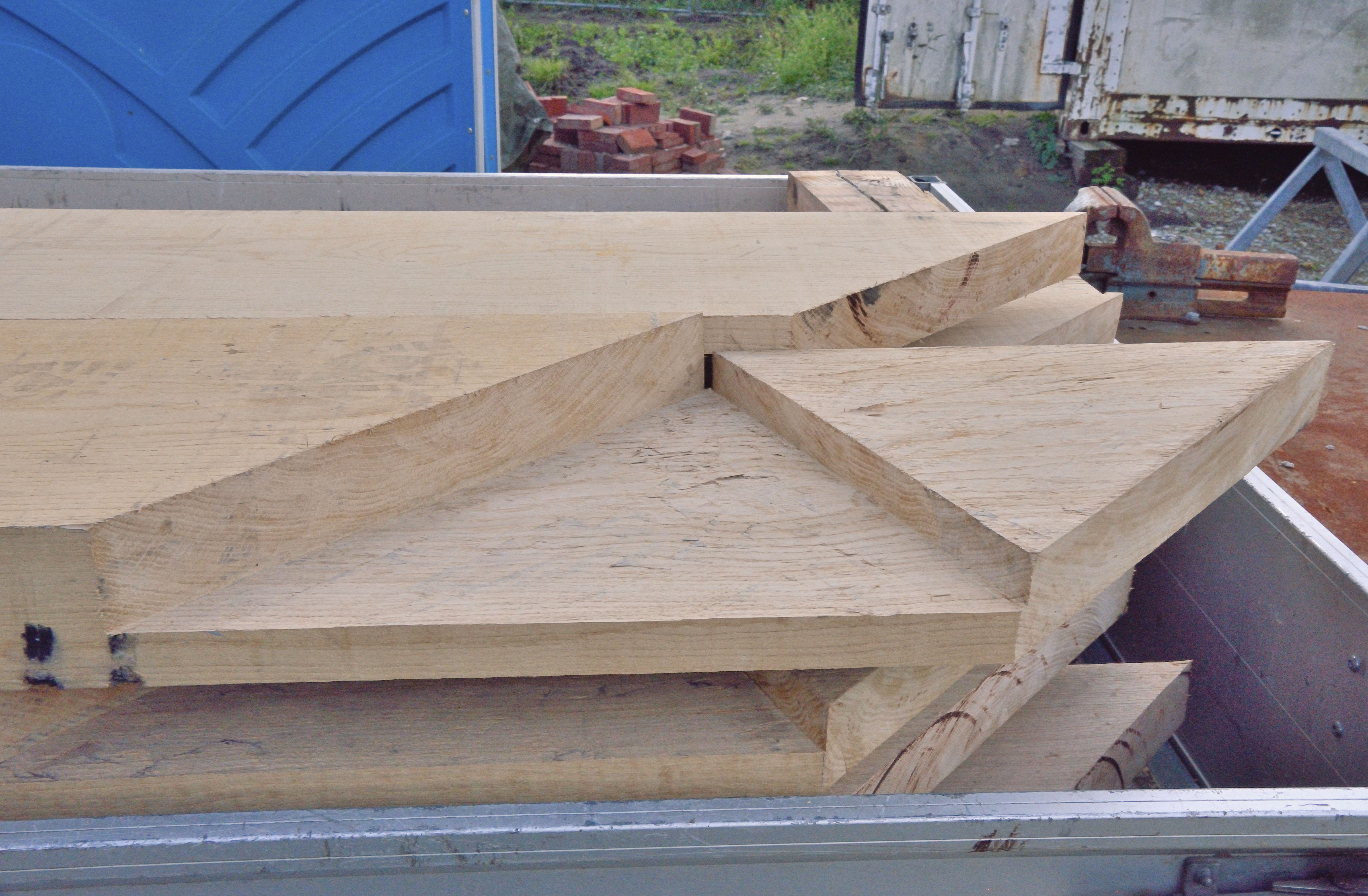 Puurveense molen, opbouw achtkant, ondertafelement met overhoekse haaklas